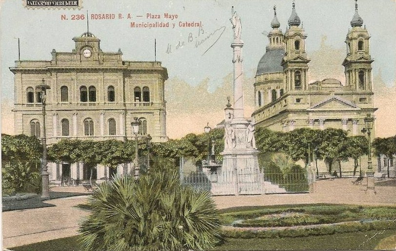 Postal de la Plaza 25 de Mayo de Rosario (Argentina) y los edificios de la Catedral y el Palacio Municipal "Casa de los Leones".